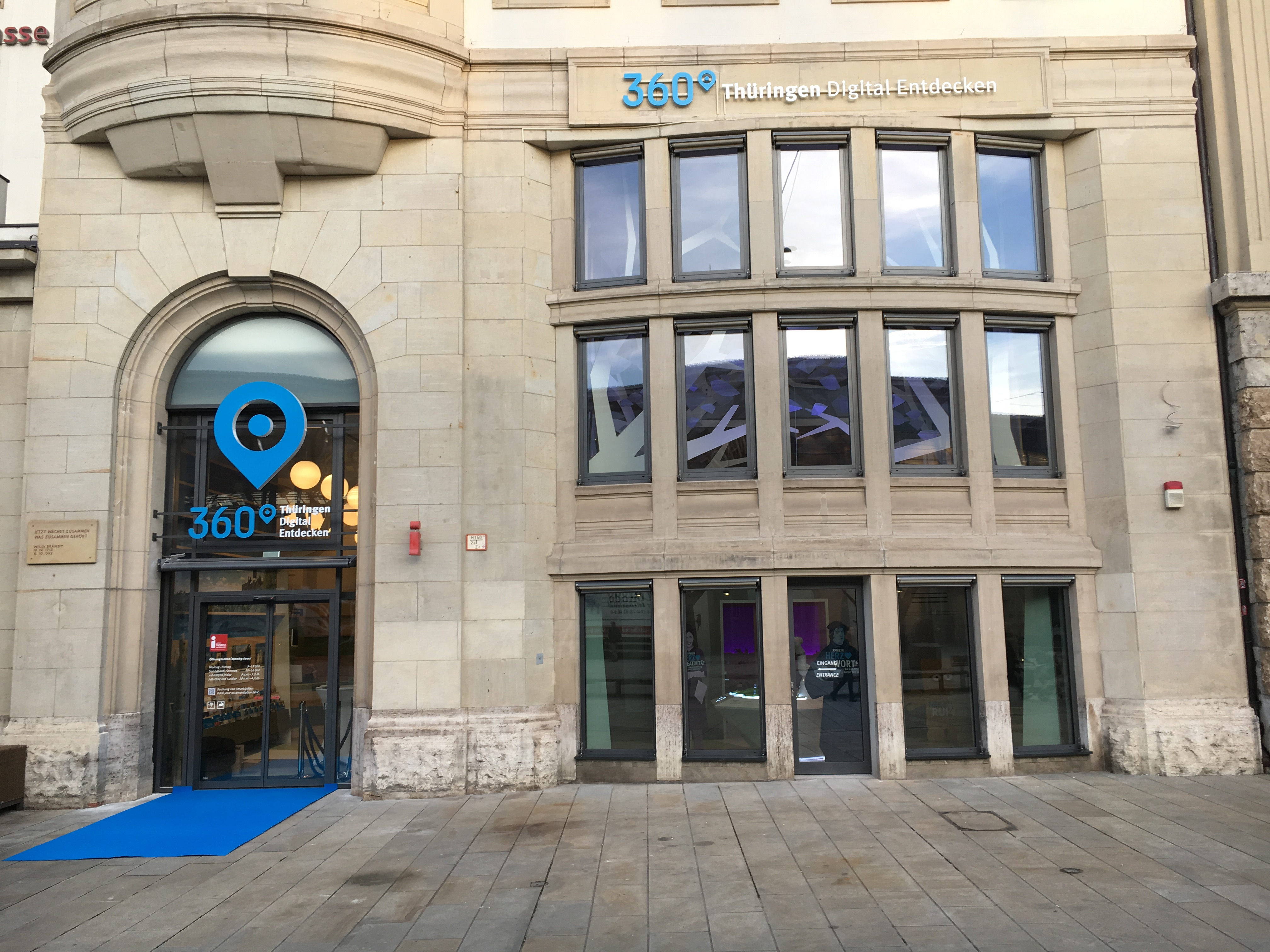 Außenansicht der Erlebniswelt 360 Grad Thüringen Digital Entdecken, im Erfurter Hof gegenüber vom Erfurter Hauptbahnhof